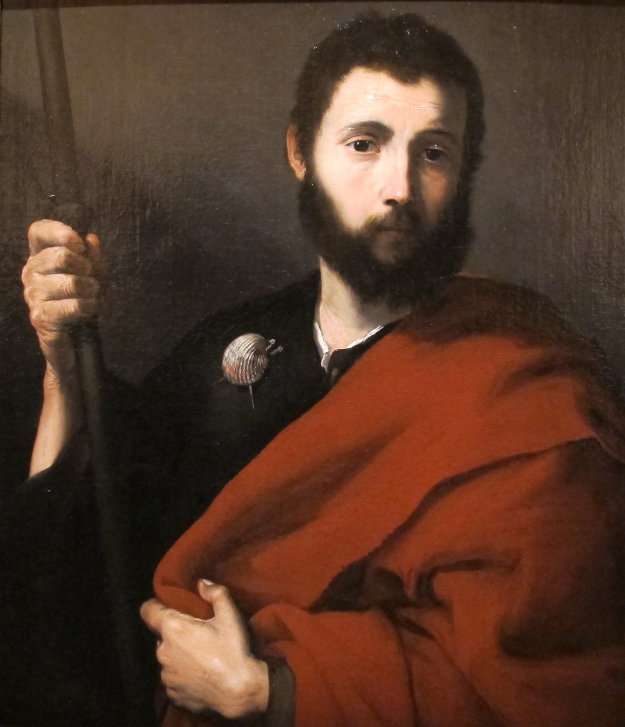 Versión reducida del archivo